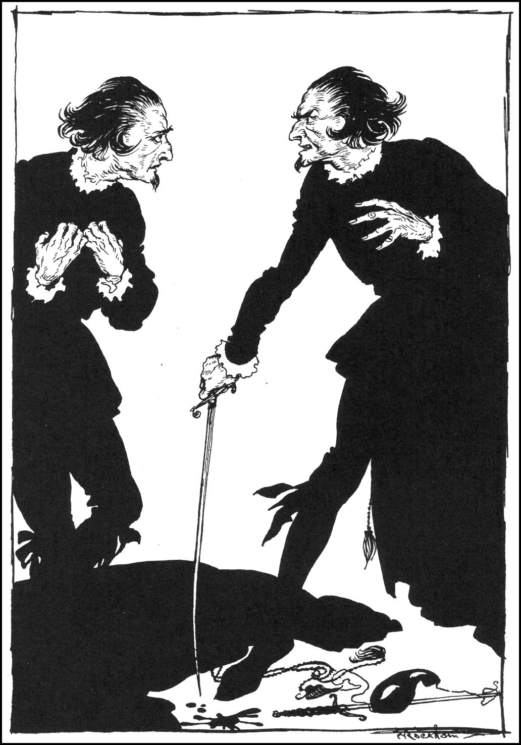 Иллюстрация Артура Рэкхема из книги "Poe's Tales of Mystery and Imagination" к рассказу Эдгара По "Вильям Вильсон"